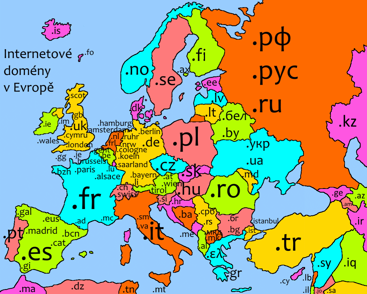 Mapa domén nejvyššího řádu